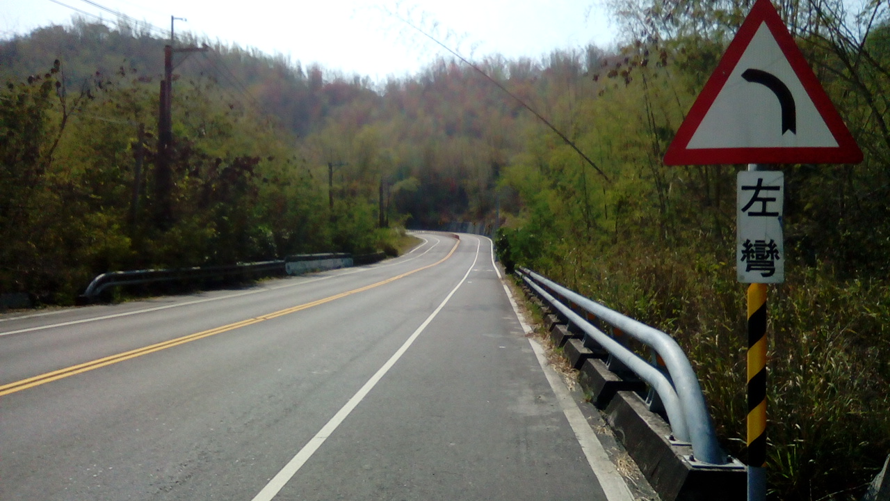 約在內門與龍崎的交界處